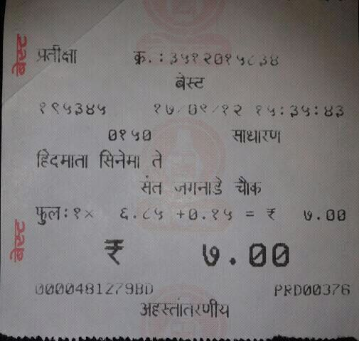 Public Transport in Mumbai Using Devnagari on Tickets